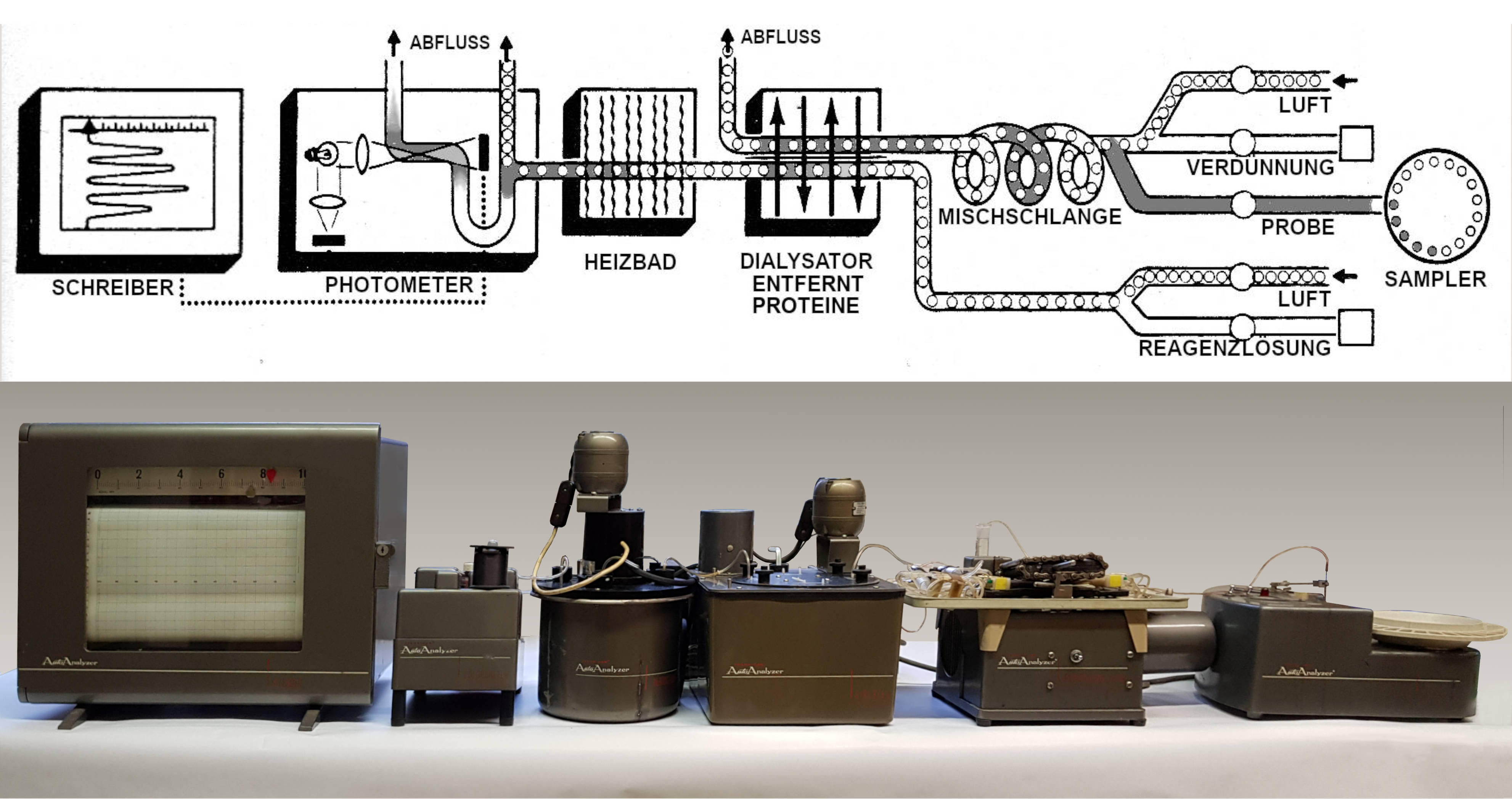 Module von rechts nach links: Probengeber, Pumpe mit Mischspiralen, Dialysator, Heizbad, Scgreiber